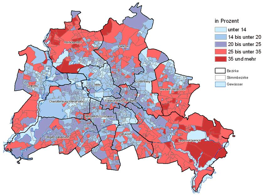 Regionale Verteilung der Abstimmungsbeteiligung beim Volksentscheid über die Offenlegung der Teilprivatisierungsverträge bei den Berliner Wasserbetrieben am 13. Februar 2011 in Berlin Anteil der Ja-Stimmen an den Stimmberechtigten nach Stimmbezirken (ohne Briefabstimmende)